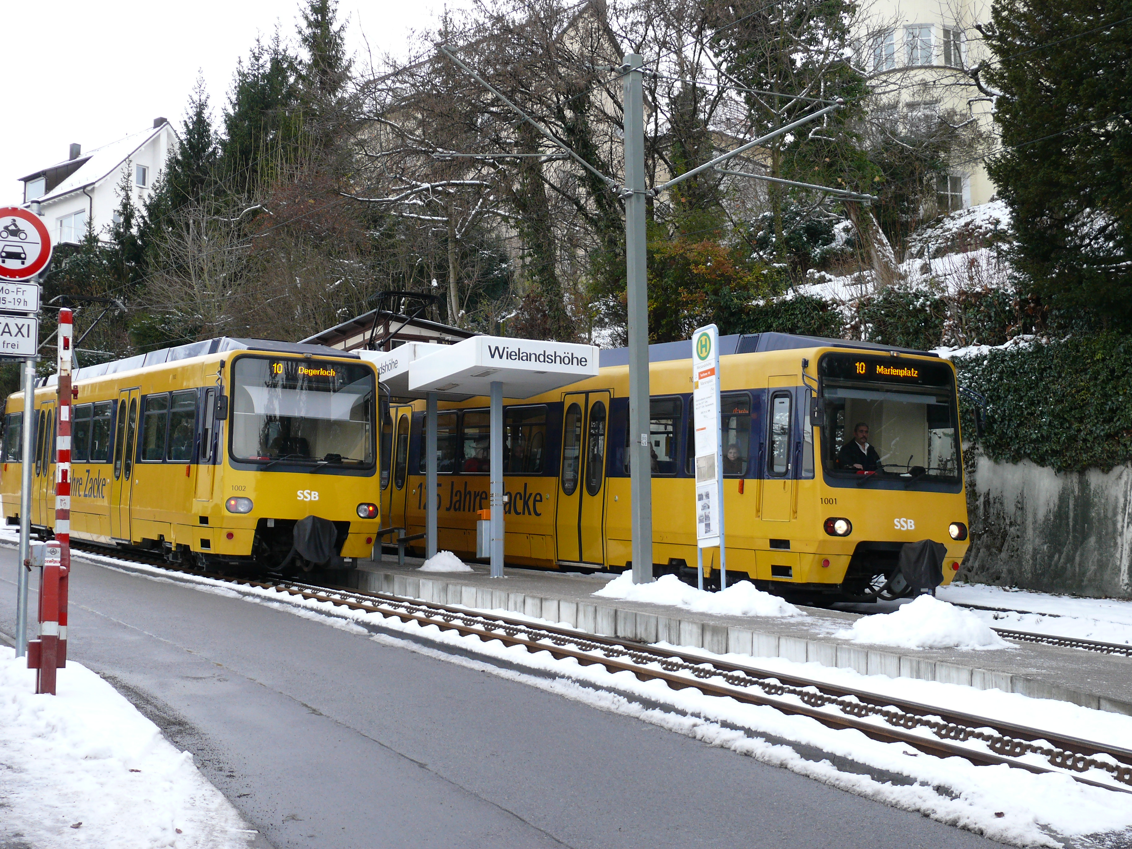 Begegnung zweier ZT4-Wagen der Stuttgarter Zahnradbahn, an der winterlichen Wielandshöhe. Hier herrscht Linksverkehr, daher befindet sich der Wagen rechts auf Talfahrt und der Wagen links auf Bergfahrt.